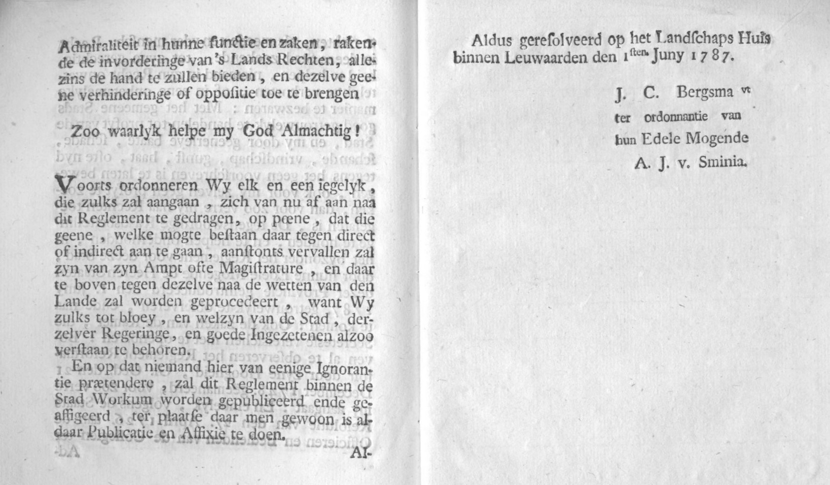 Reglement van Regeringe voor de stad Workum